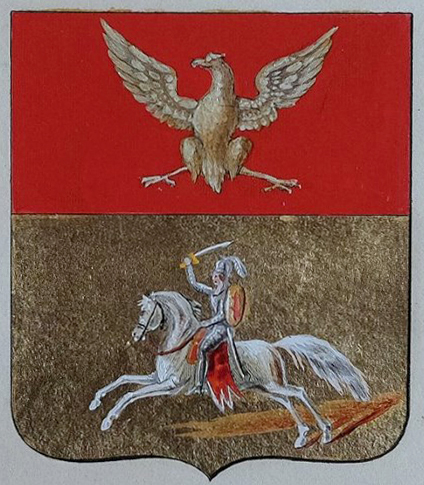 Беларуская (тарашкевіца): Герб Беластоцкай (Biełastok) вобласьці з Пагоняй (Pahonia)